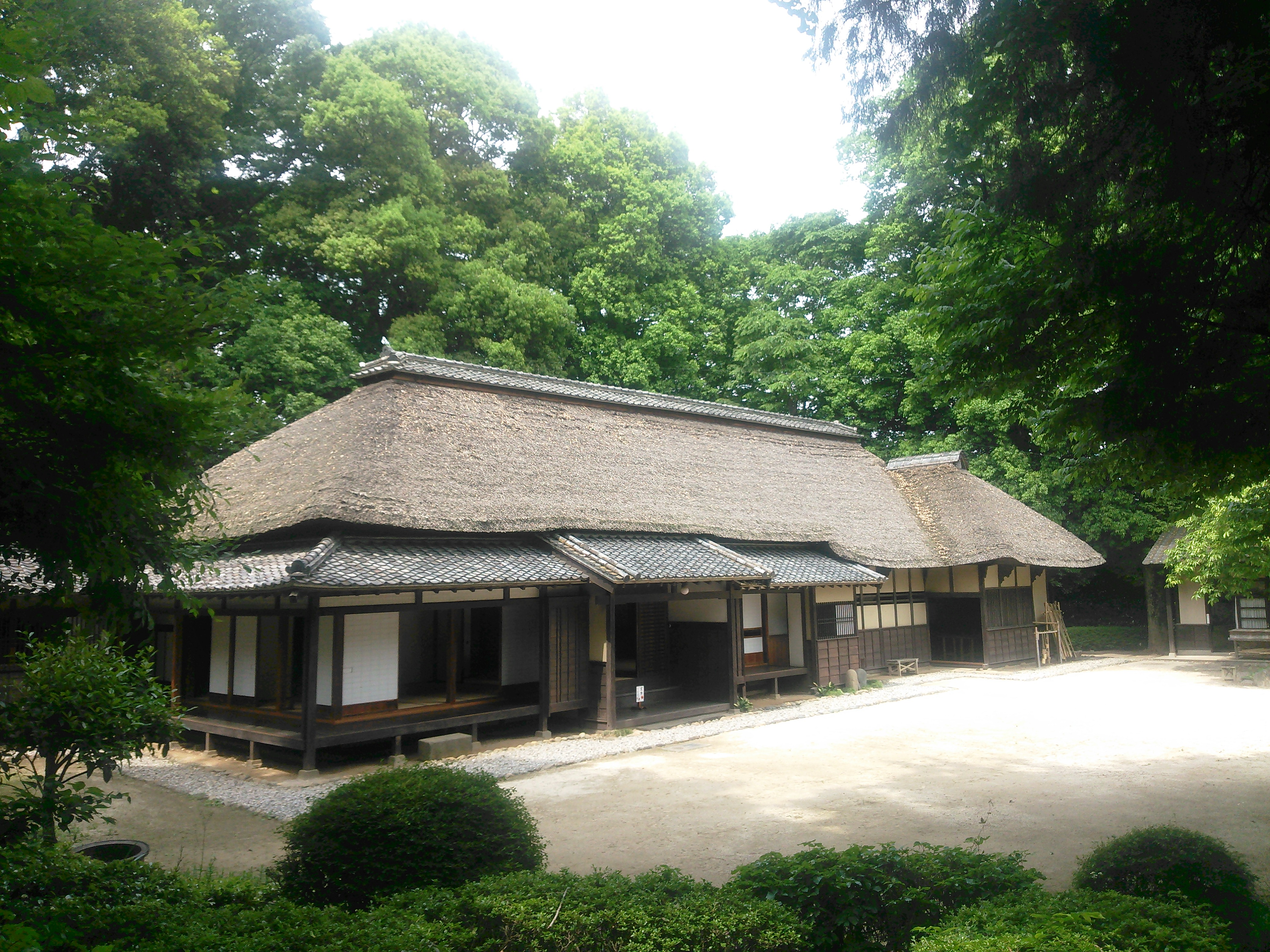 さいたま市見沼区、旧坂東家住宅見沼くらしっく館